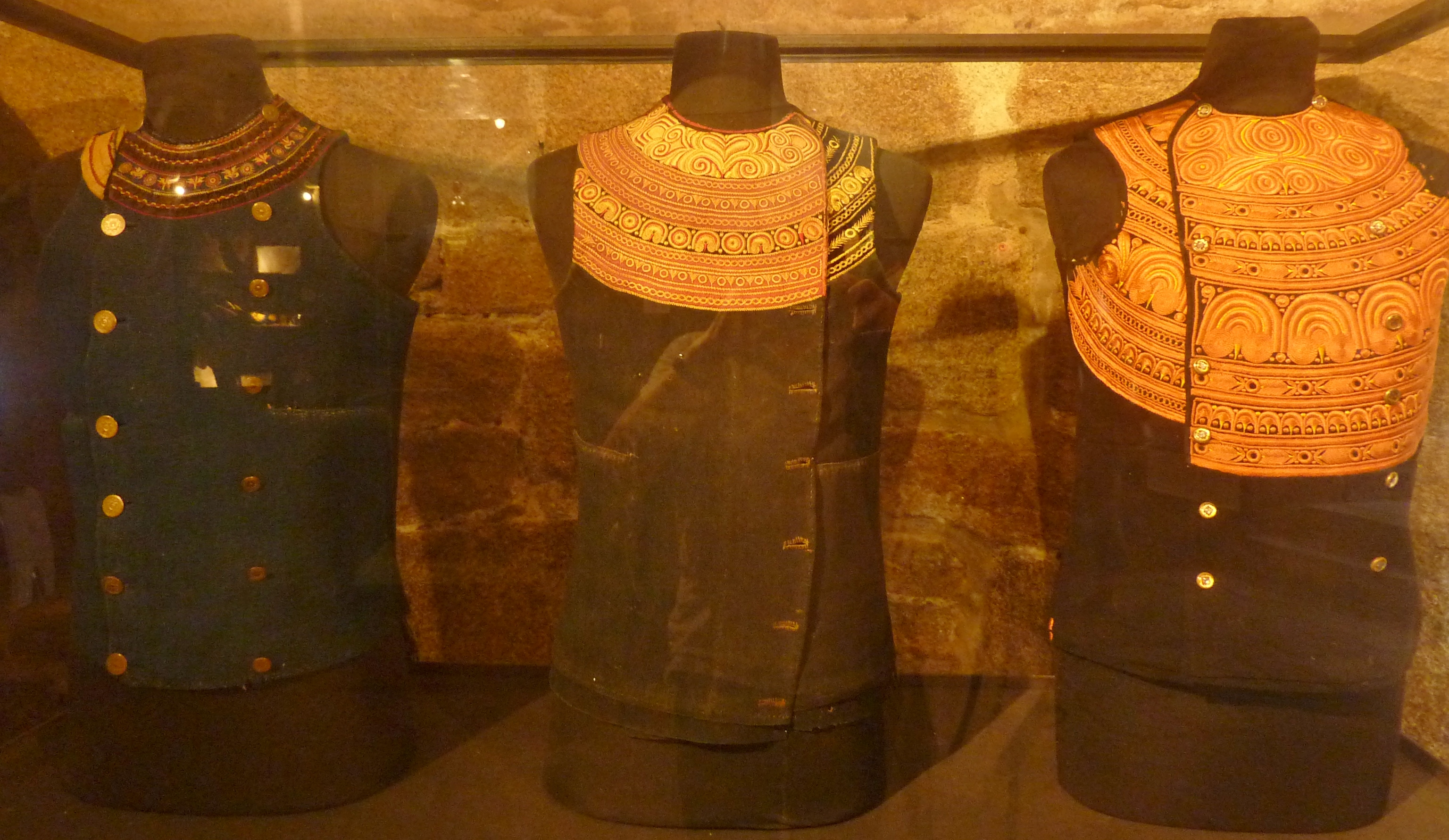 Pays bigouden : gilets masculins entre 1860 et 1900 (Musée bigouden, Pont-l'Abbé). Cette photo illustre l'évolution rapide de la broderie bigoudène depuis la simple encolure brodée du milieu du XIXème siècle jusqu'au plastron totalement décoré vers 1900.